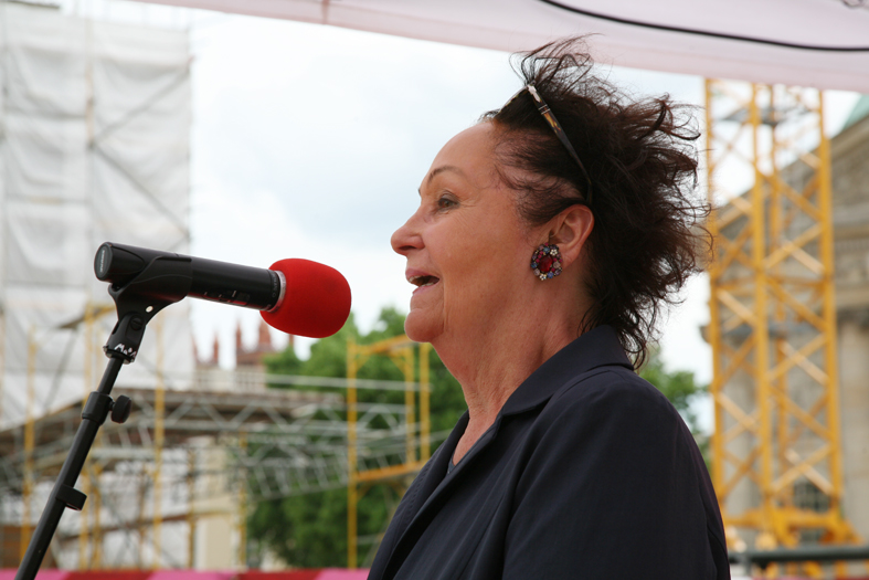 Die Bundestagsfraktion DIE LINKE lud auch in diesem Jahr zum Lesen gegen das Vergessen auf den Berliner Bebelplatz. Damit soll an die Bücherverbrennung von 1933 und den Umgang der Nationalsozialisten mit Andersdenkenden erinnert werden. Die Werke der Autoren, deren Bücher verbrannt wurden, kann man neu auflegen, die verbrannten Menschen bleiben verloren.